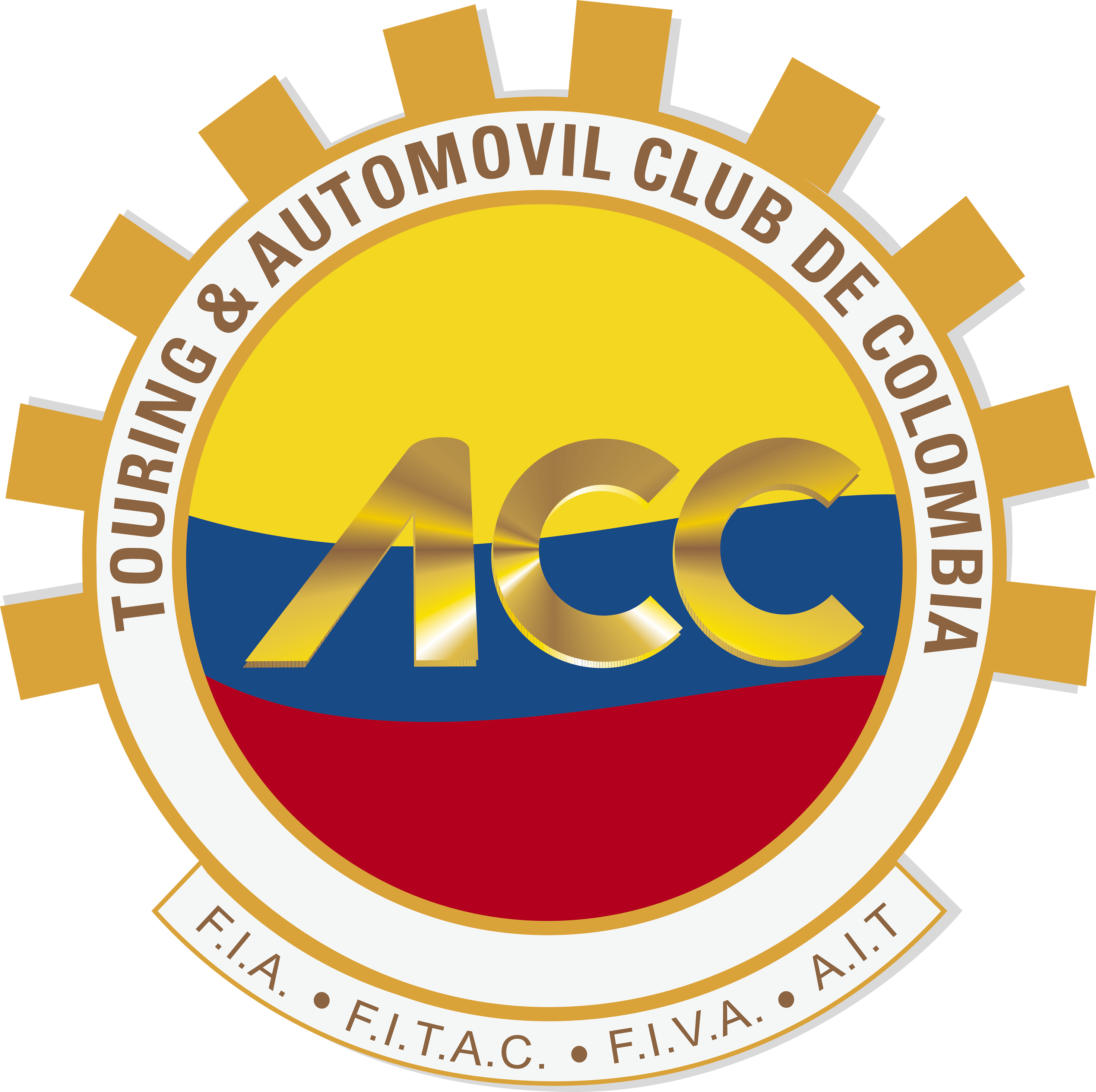 Escudo Automovil Club de Colombia